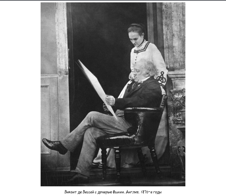 Виконт де Весcи с дочерью Фанни. На лицевой стороне надпись на английском языке:“For Simon Woronzow From Ema de Vesse”, (Семену Воронцову от Эммы де Весcей), на оборотной стороне — “Viconot de Vesei & his daughter Fanni Marehionep of Bath. Photographed by his daughter Lady Richard Grosvenov”. (Виконт де Вессей и его дочь Фанни. Фотография сделана его дочерью леди Ричард Гросвеноу (вероятно, это Элизабет - жена барона Ричарда Гросвенора)) Эмма де Весcей, урождённая Герберт (1819—1884), пятая дочь Георга-Августа, 11 графа Пемброка и 8 графа Монтгомери (1759—1827) и графини Екатерины Семеновны Воронцовой (1783—1856) и соответственно внучка графа Семёна Романовича Воронцова